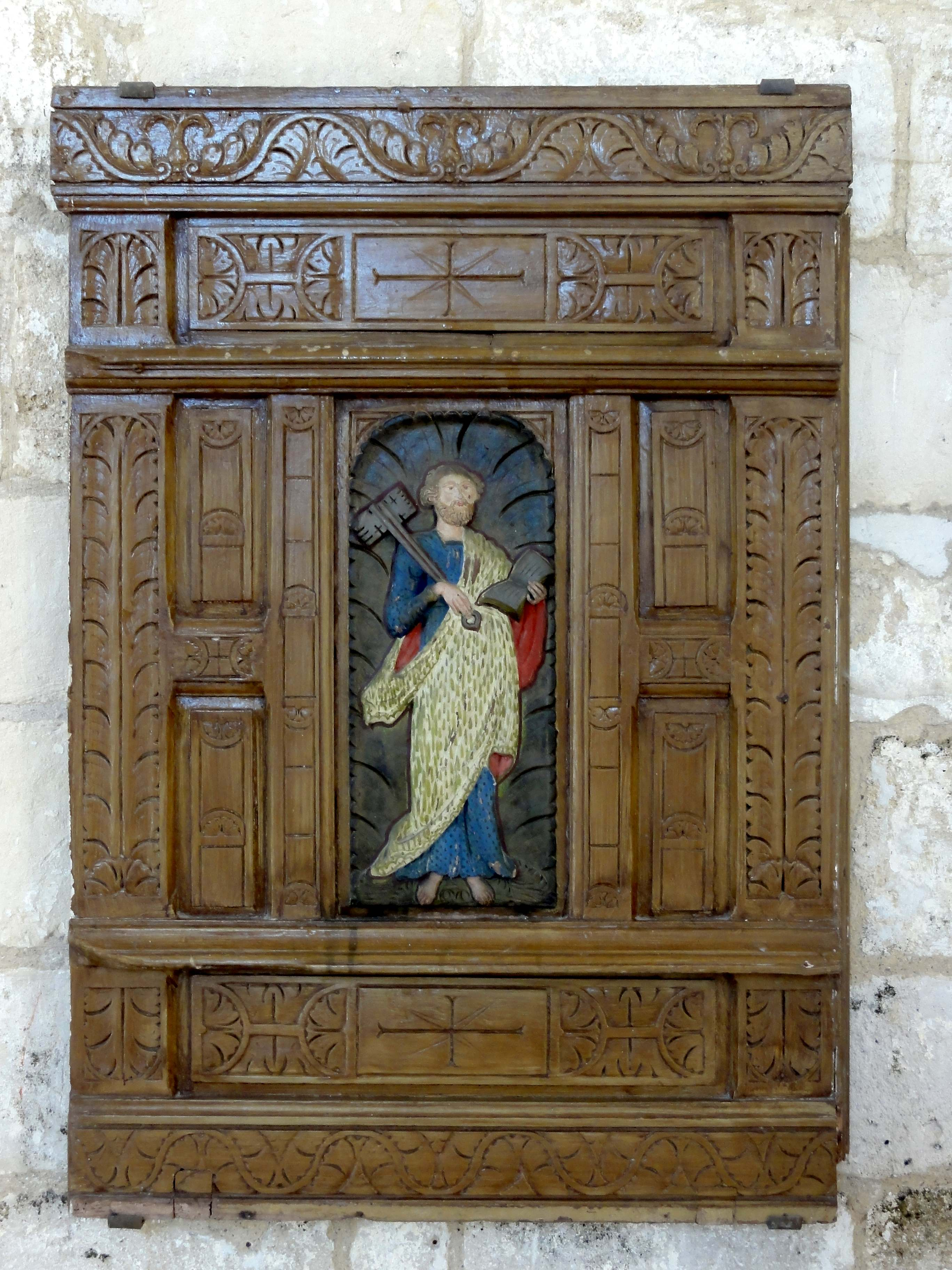 Mobilier de l'église (voir titre).